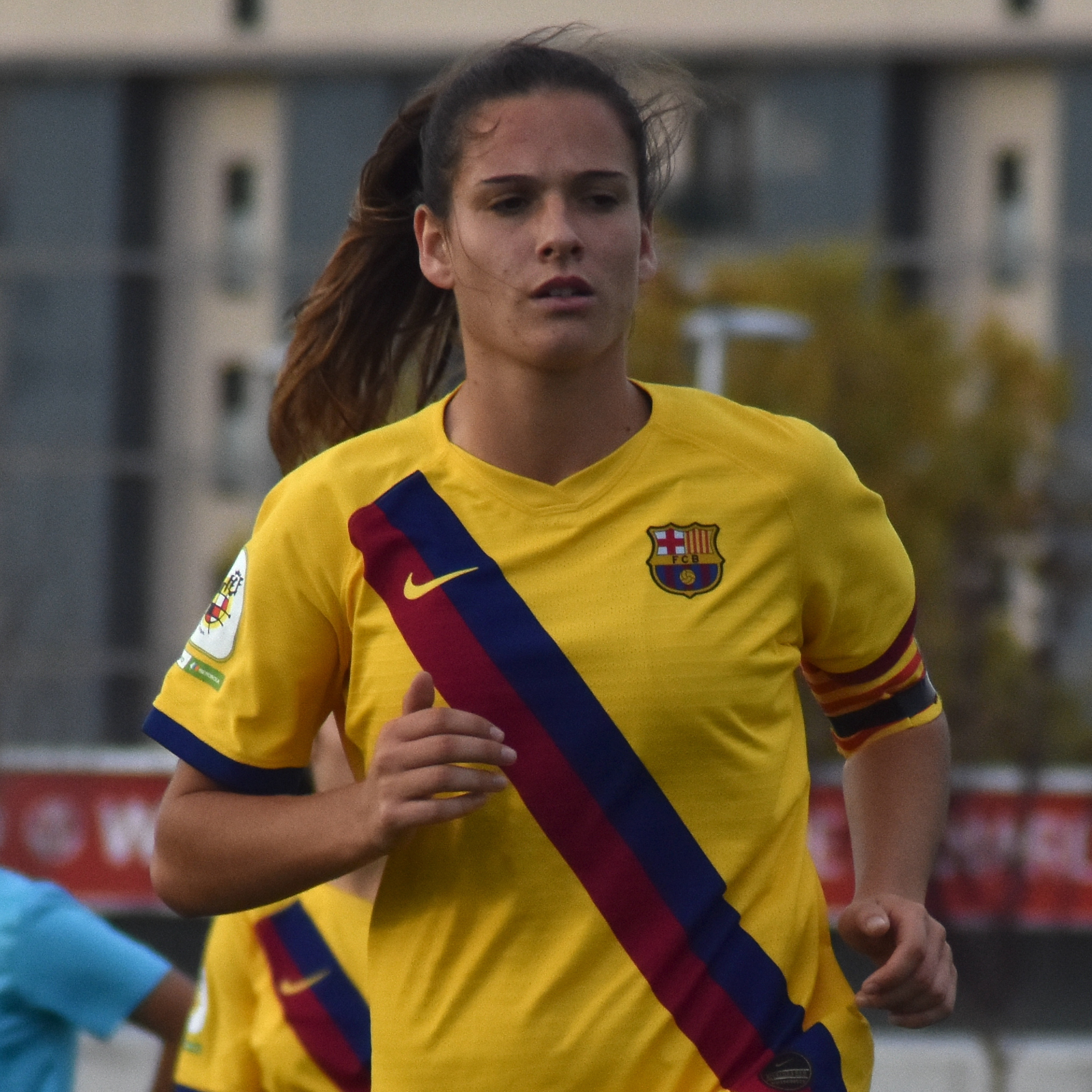 Laia Codina Panedas, futbolista del FC Barcelona "B", en el partido ante el Atlético de Madrid "B" en noviembre de 2019.